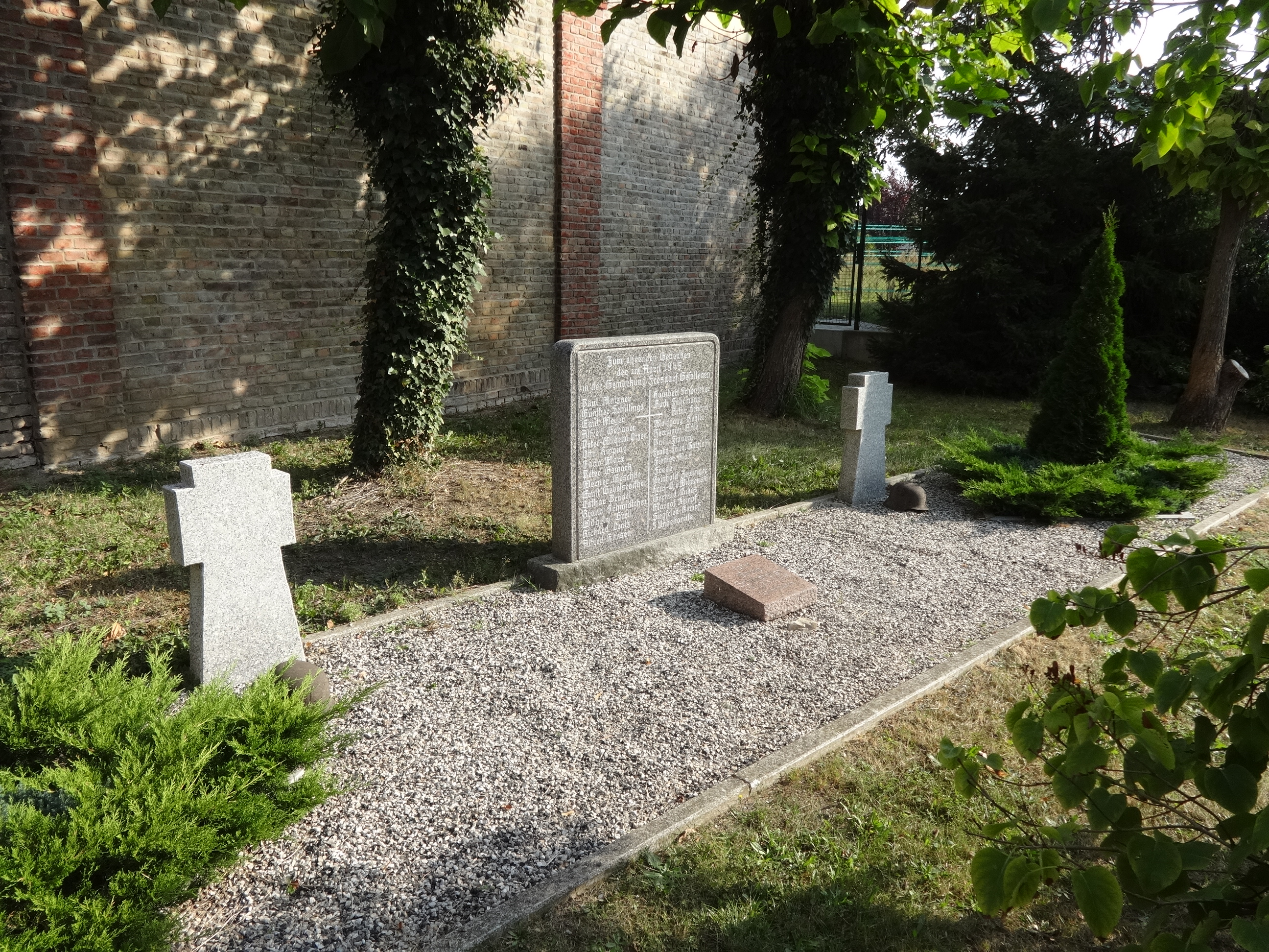 Die Kirche in Fresdorf entstand 1724 auf dem Fundament eines mittelalterlichen Vorgängerbaus. In dem schlichten Bauwerk steht ein Kanzelkorb aus dem Anfang des 18. Jahrhunderts.